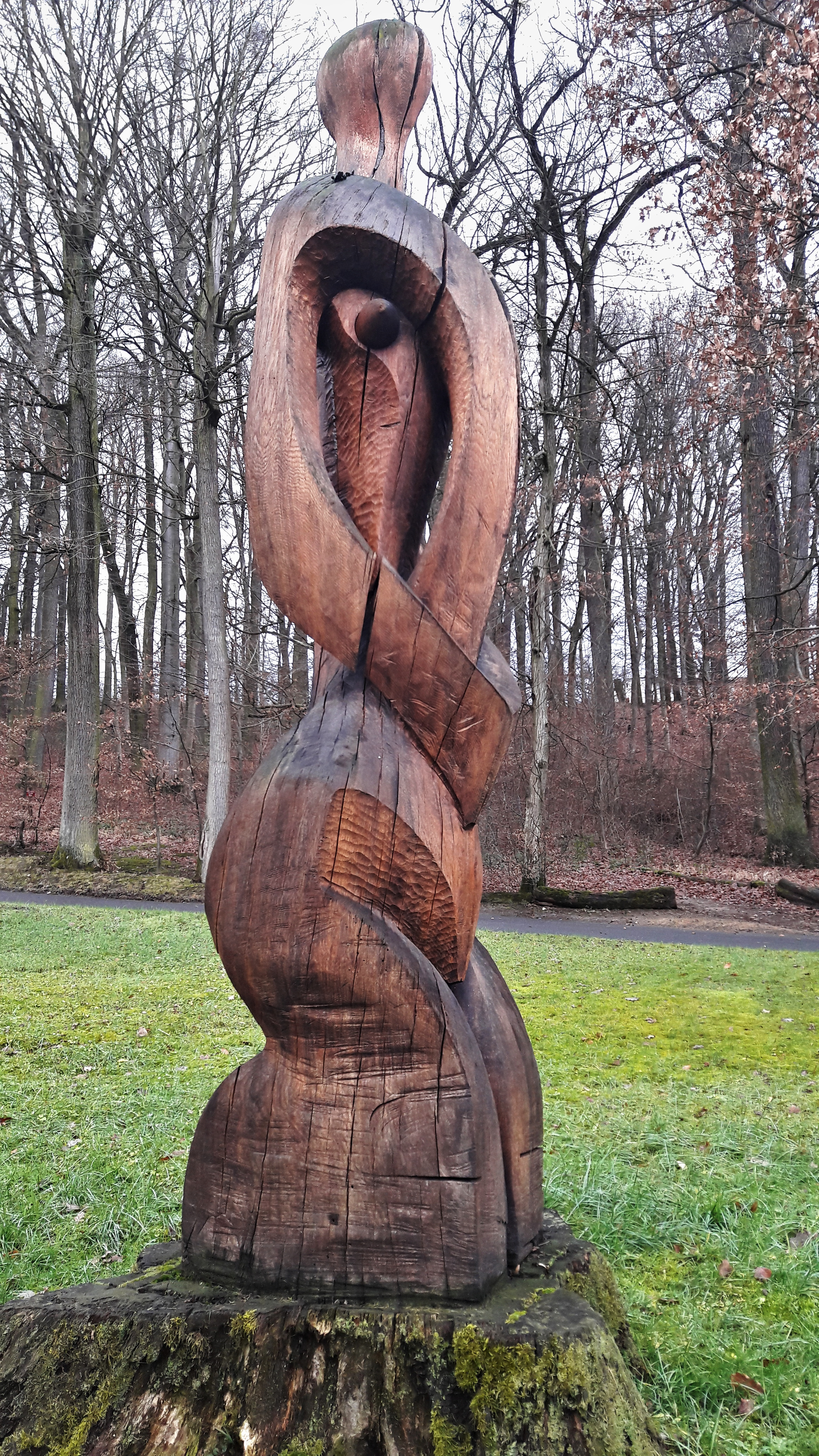 Zlín-Lešná - Africká Venuše